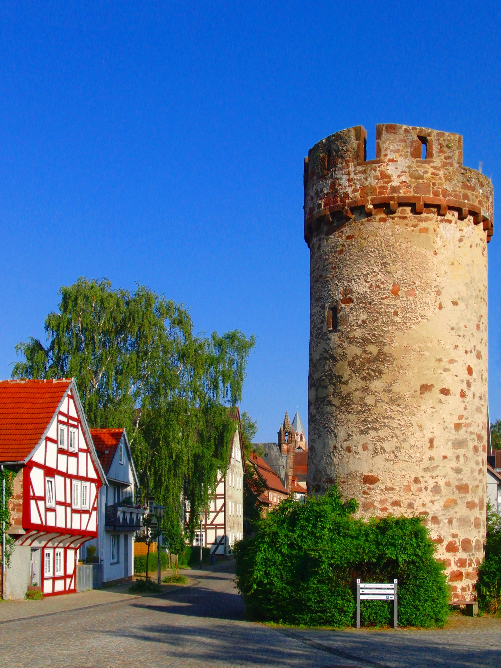 Der Hexenturm in Schwalmstadt(Hessen), Deutschland